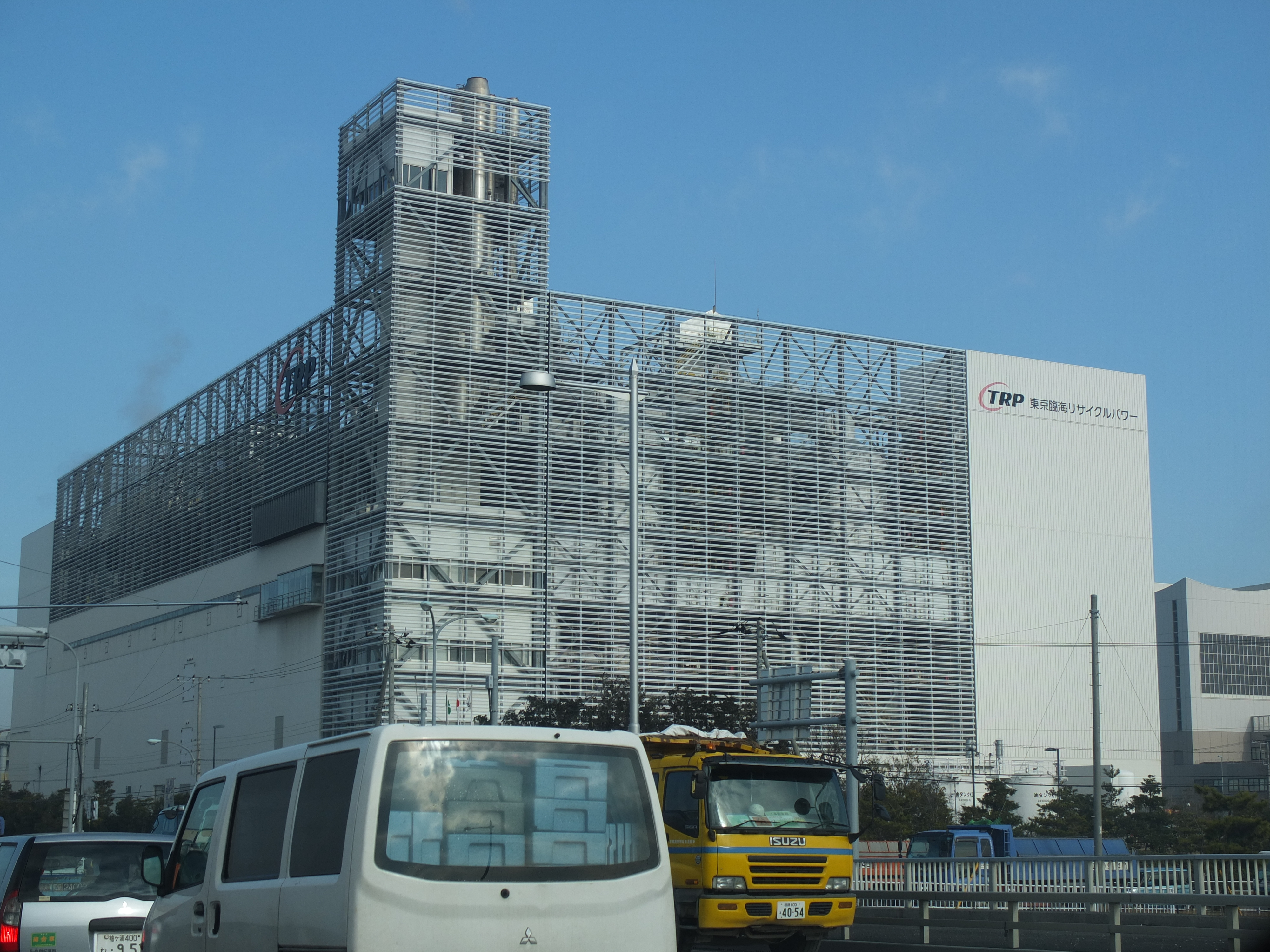 東京臨海リサイクルパワー株式会社外観